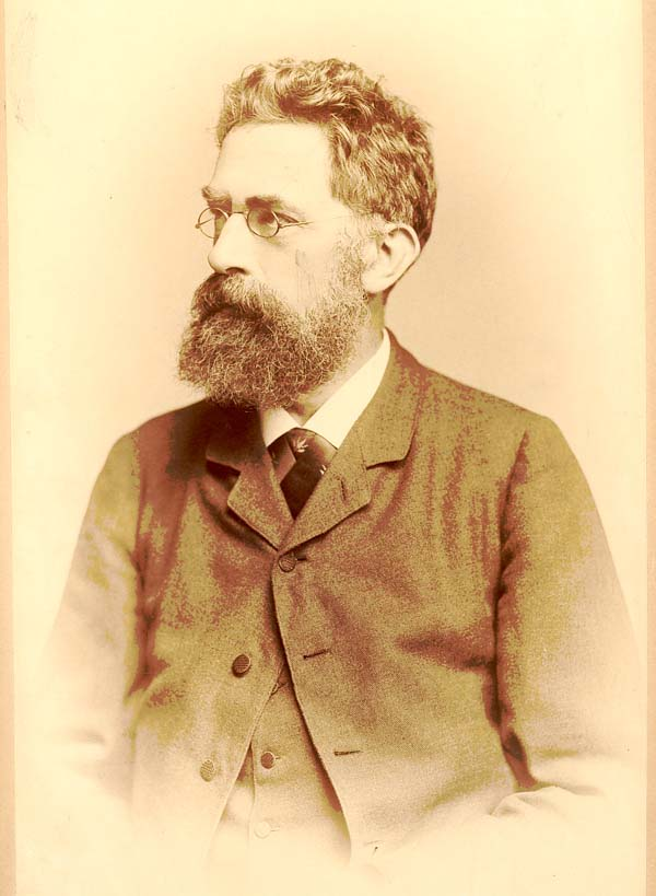 Portrait des deutschen Tiermalers Gustav Mützel